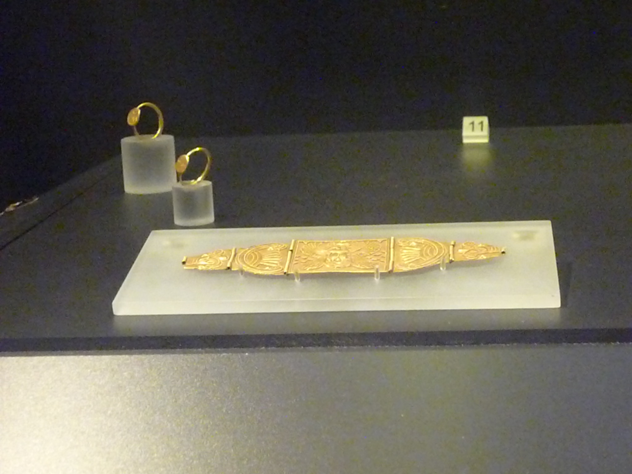 Museo archeologico nazionale di Cagliari This is a photo of a monument which is part of cultural heritage of Italy.